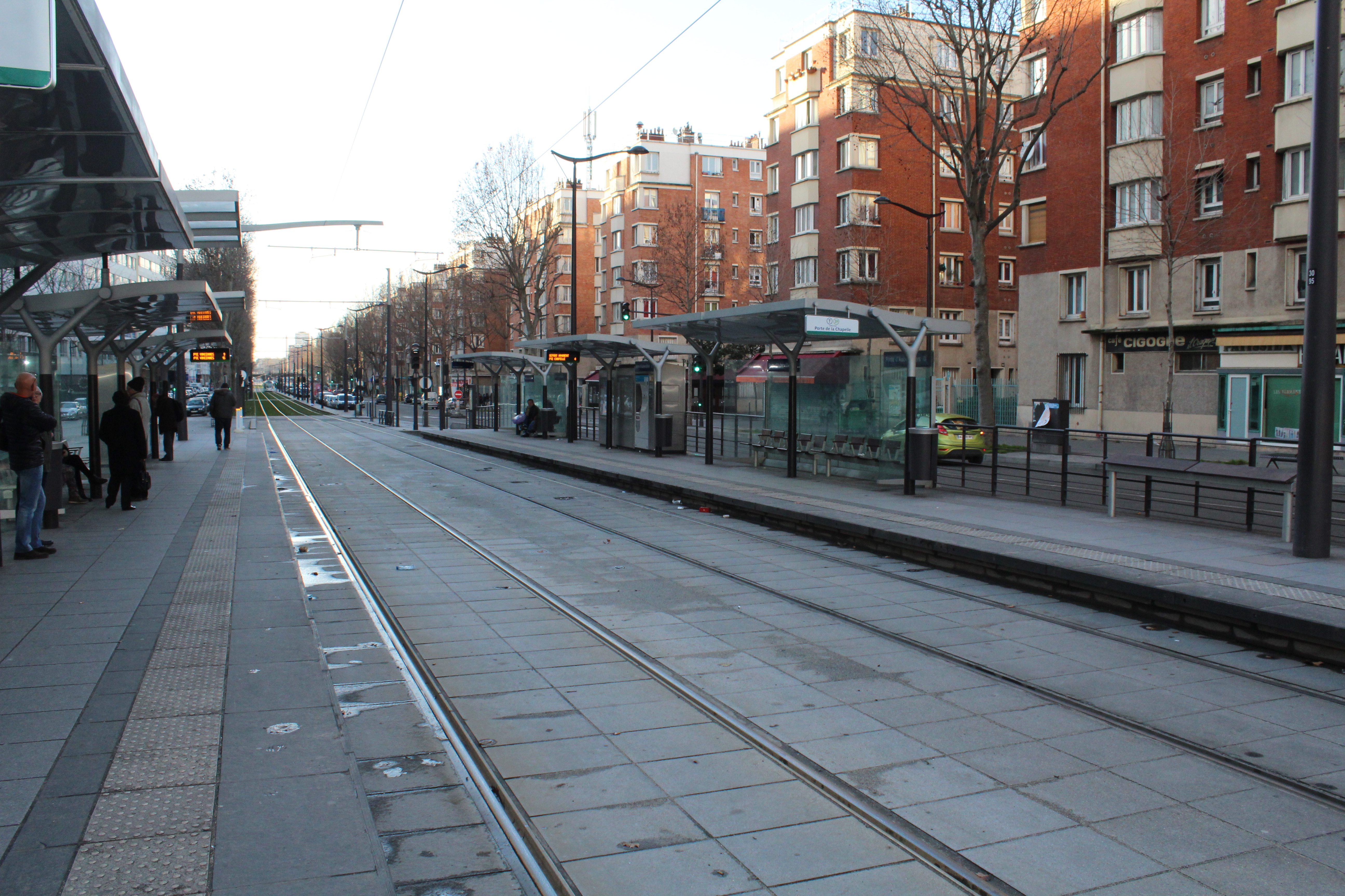 Station de tramway Porte d'Aubervilliers sur la ligne 3b du tramway d'Île-de-France.